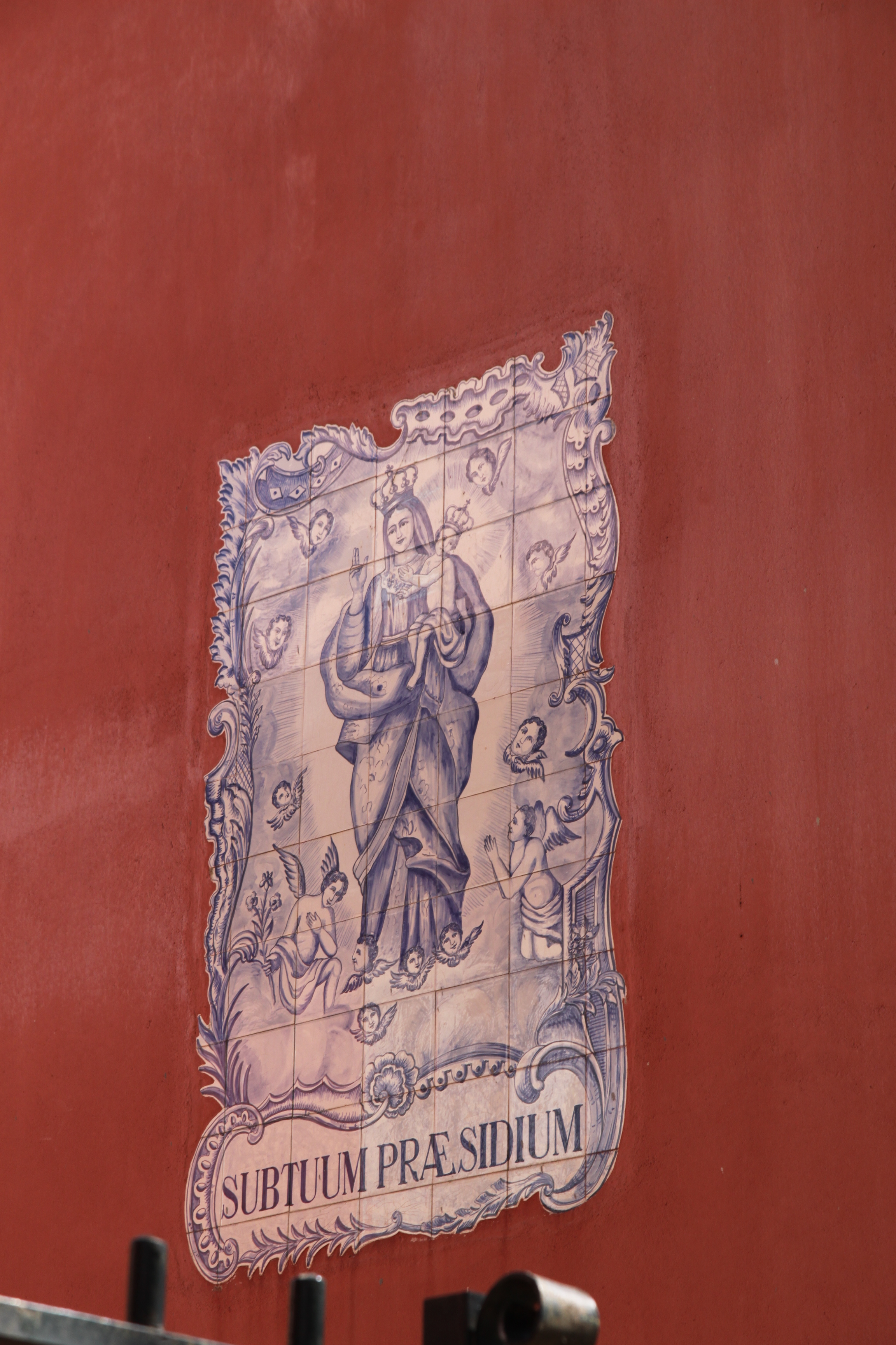 Quinta dos Lagares d'El-Rei This file was uploaded for Wiki Loves Monuments in Portugal with the unique identifier 75032.